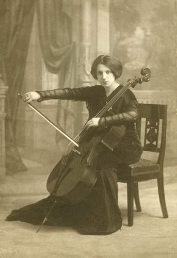 Guilhermina Augusta Xavier de Medim Suggia (1885 — 1950), violoncelista portuguesa